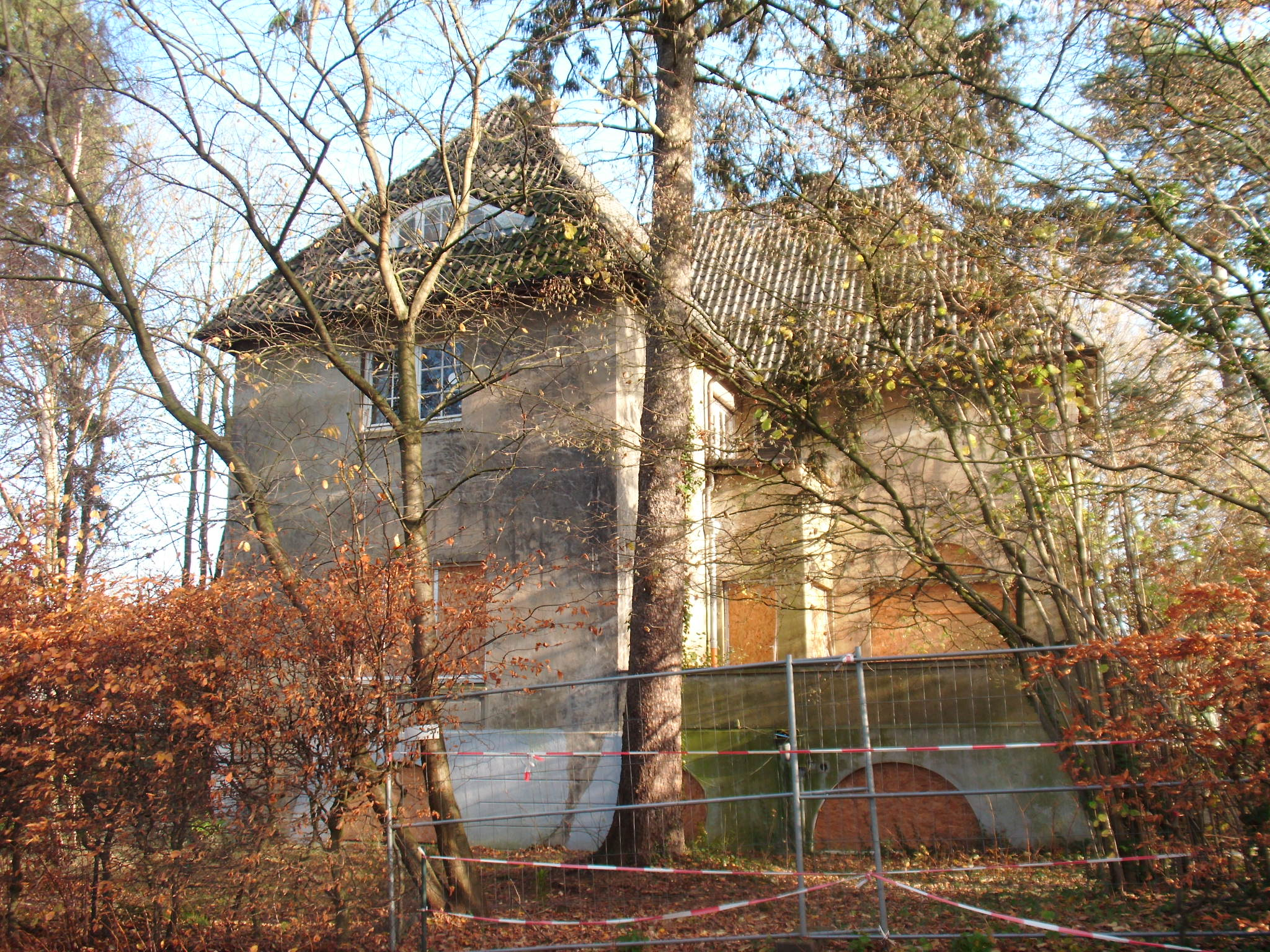 Wohnhaus des Dichters Richard Dehmel. Erbaut vor 1910 von BaedeckerThis is a photograph of an architectural monument.